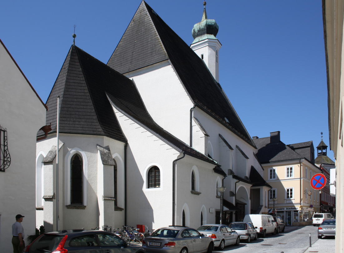 Nordostansicht der Stadtpfarrkirche St. Ulrich in der oberösterreichischen Stadt Vöcklabruck.